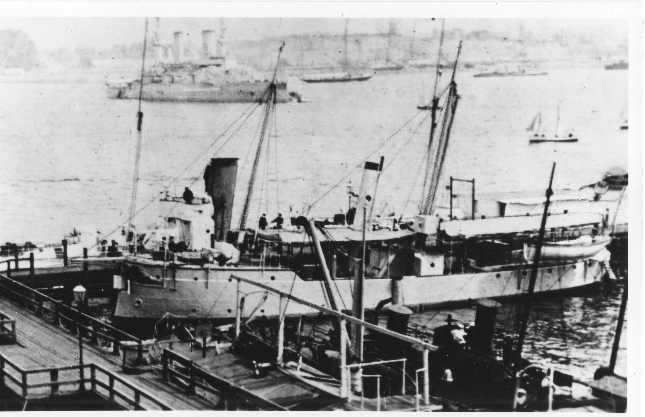 Ehemaliges Kanonenboot SMS OTTER um 1900